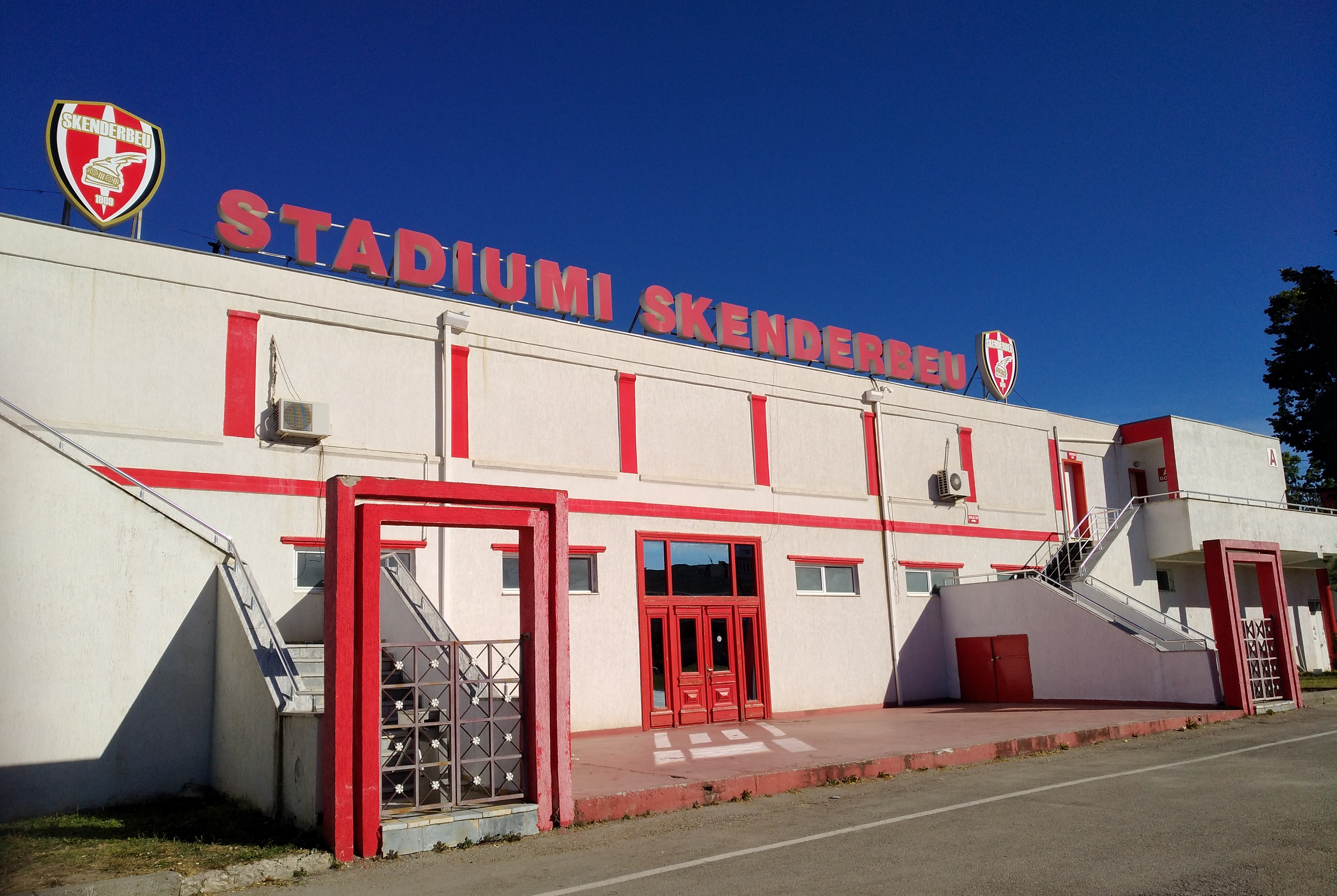 Stade Skënderbeu, à Korçë (Albanie).